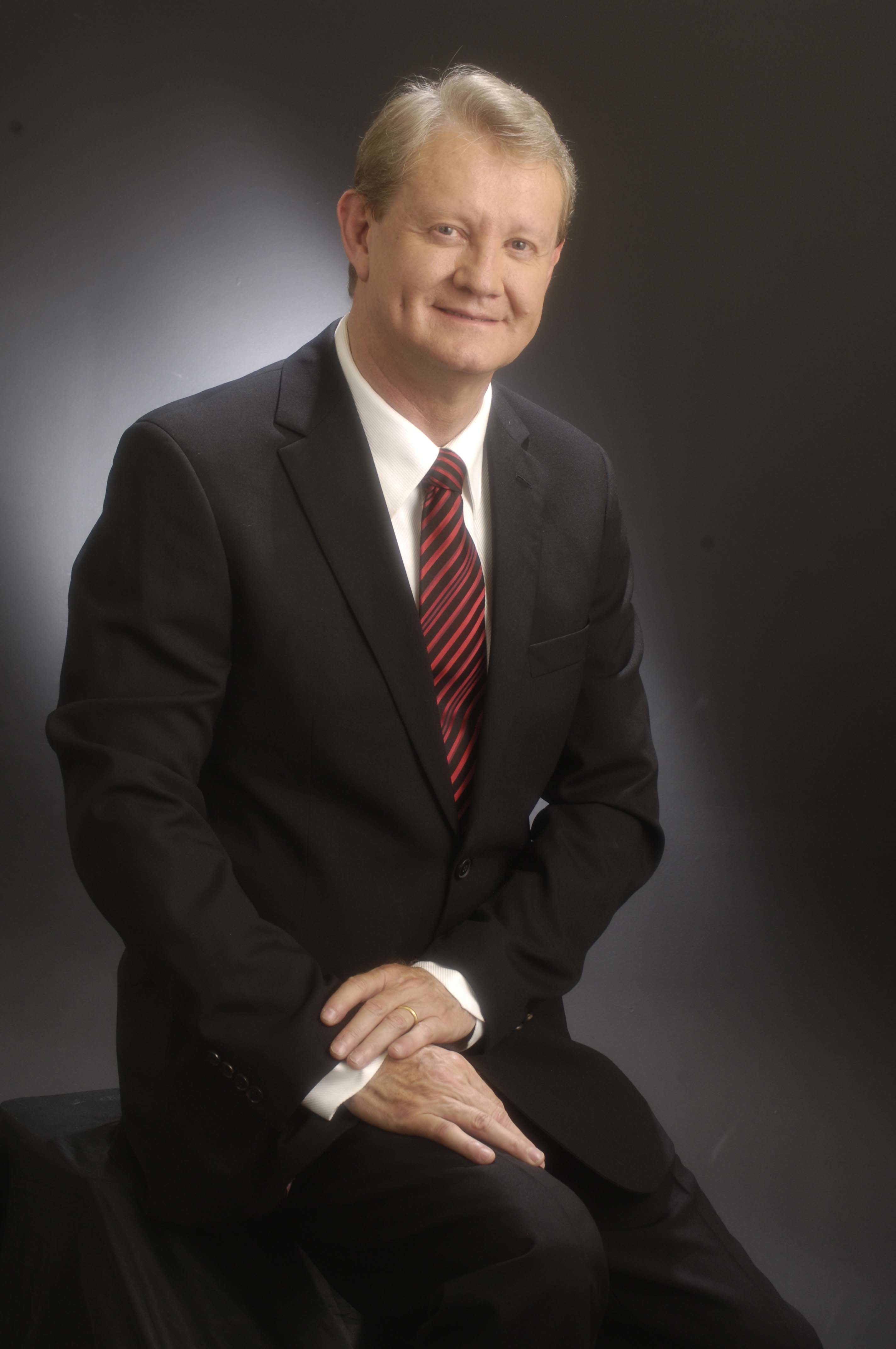 ARQUITECTO HEBERTO CASTILLO JUÁREZ 2011